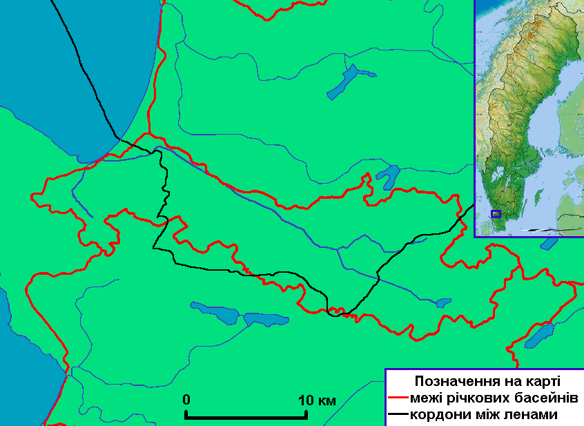 Карта річки Стенсон на півдні Швеції у ленах Сконе і Галланд. Створено на основі карти річок лену Сконе Skåne län на сайті SMHI Шведського інституту метеорології та гідрології. Використано карту File:Sweden relief location map.jpg.